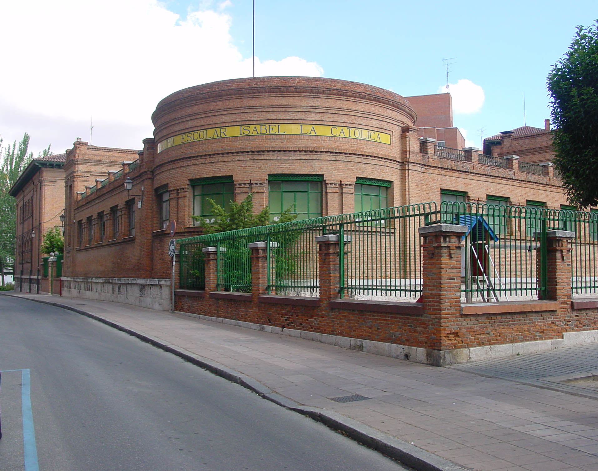 Grupo Escolar Isabel la Católica en el barrio de San Nicolás de Valladolid, España; fachada sur donde está la piscina. Ocupa el solar donde se encontraba desde el siglo XVII la Casa Pía de la Aprobación para recogida de prostitutas arrepentidas.